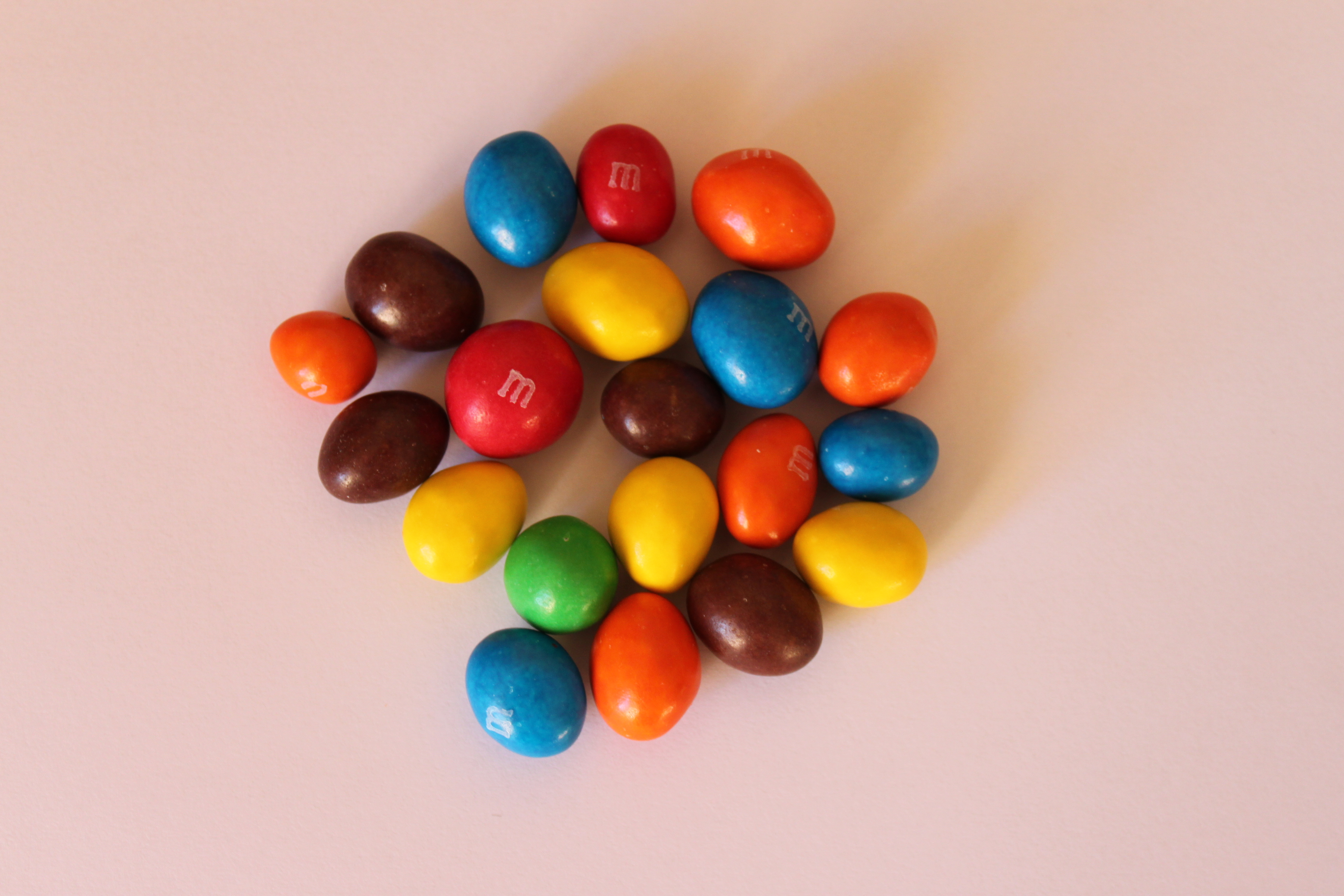 Contenu d'un packet de m&m's